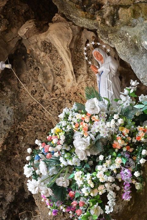 Fatumaca, Gariuai